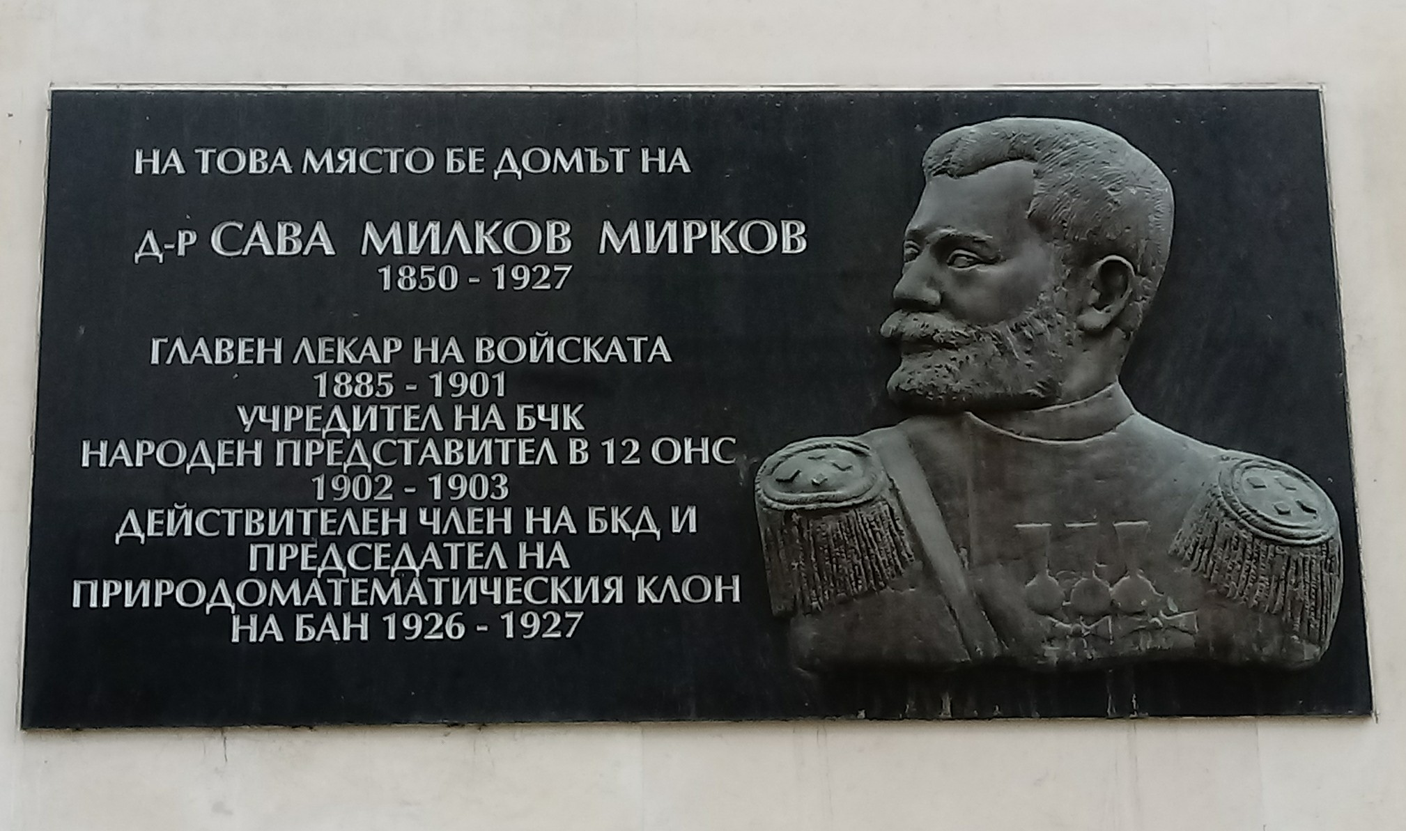 Sava Mirkov memorial plaque, 8 Aksakov Str., Sofia